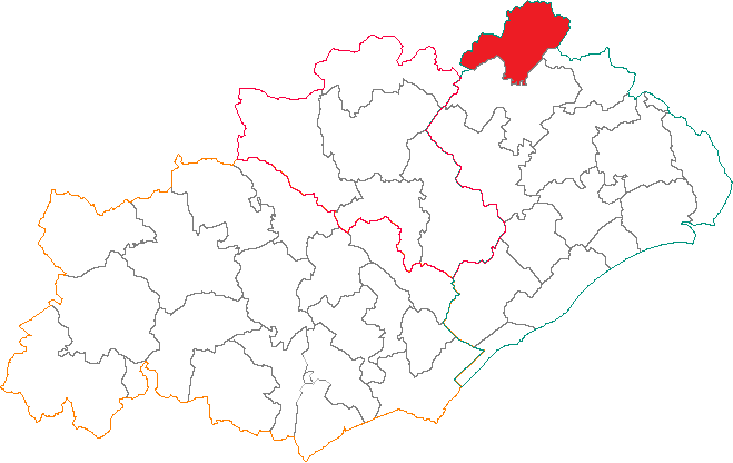 Situation du canton dans le département de l'Hérault.